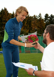 Monika Merl (geb. Gradzki) in Menden (Sauerland) nach ihrem 800 Meter Lauf